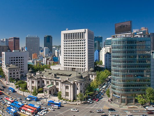 한국은행 본점 사진_포스트타워에서 촬영